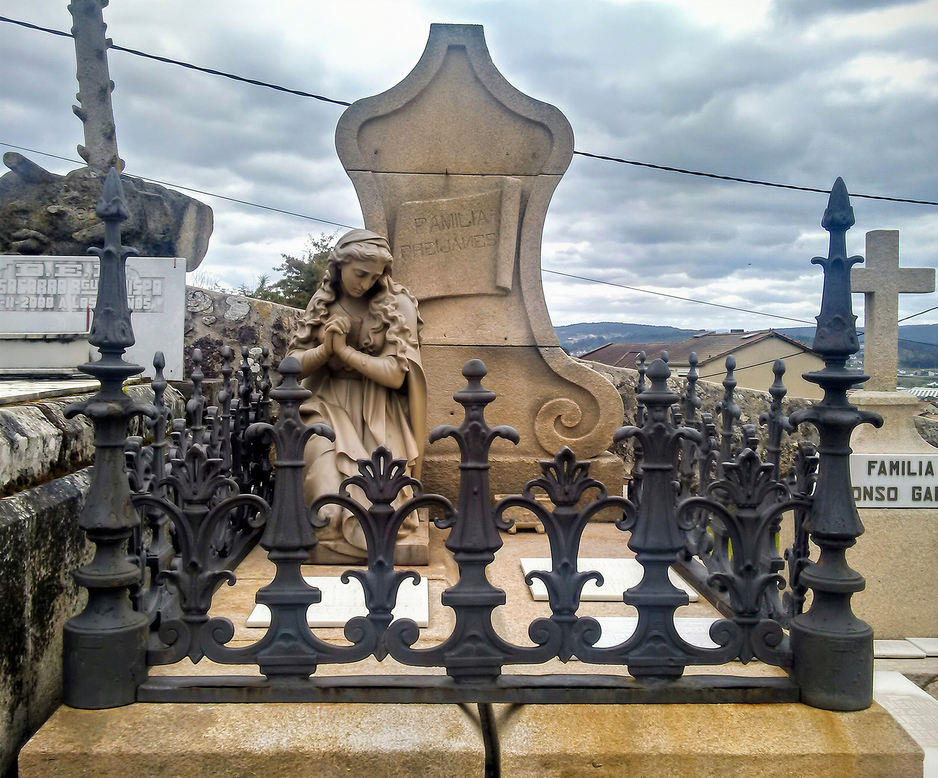 Joven arrodillada y verja (fundición Malingre)